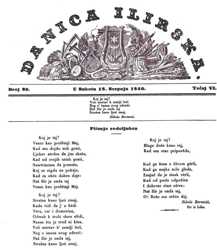 Danica Ilirska, novine koje je izdavao Ljudevit Gaj.